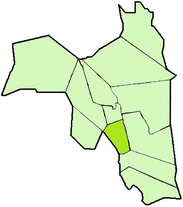 Lapinjärven kartta: Pekinkylän sijainti